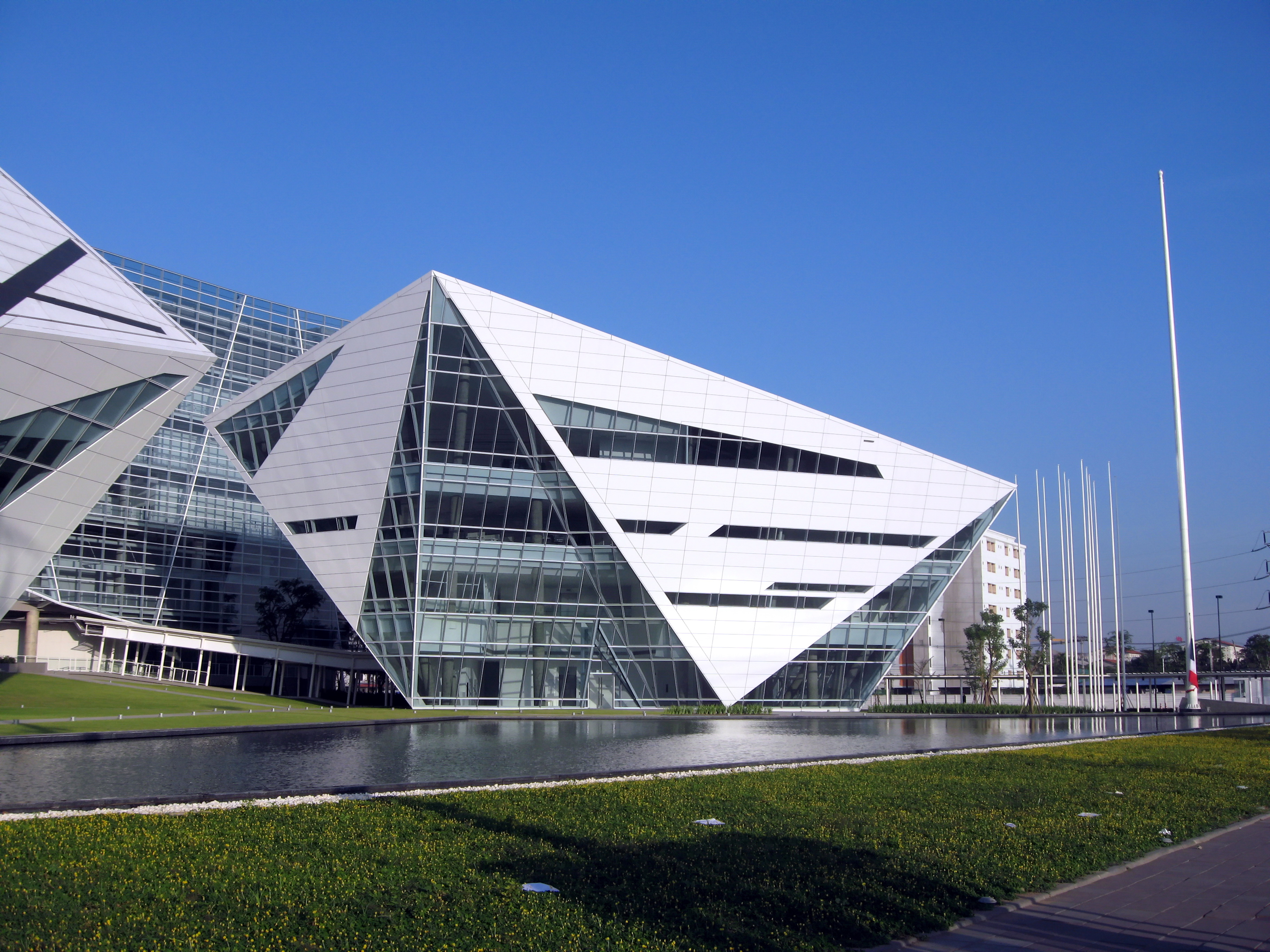 Bangkok Universit..Rangsit campus.